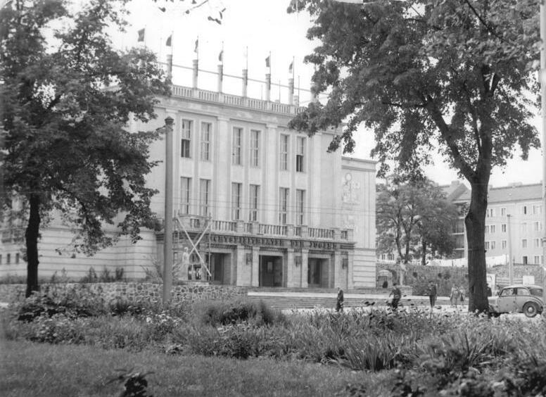 Frankfurt/Oder, Lichtspieltheater Zentralbild Mehler Quasch-Ho. 31.10.1957 Frankfurt-Oder Die Stadt Frankfurt-Oder wurde während des Krieges zu etwa 70 % zerstört. Sie verlor insgesamt etwa 1000 Gebäude, davon allein 750 in der Innenstadt. Für den Neuaufbau der Stadt stehen dem Rat der Stadt im Jahre 1957 rund 13 Millionen DM zur Verfügung. Im neuen Stadtzentrum werden etwa 1500 neue Wohnungen entstehen. UBz: Das Lichtspieltheater "Theater der Freundschaft"